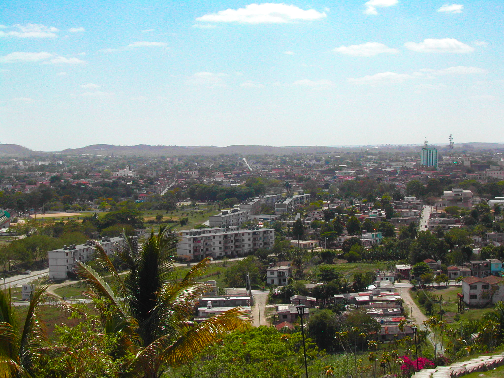 Iwwerbléck iwwer Santa Clara